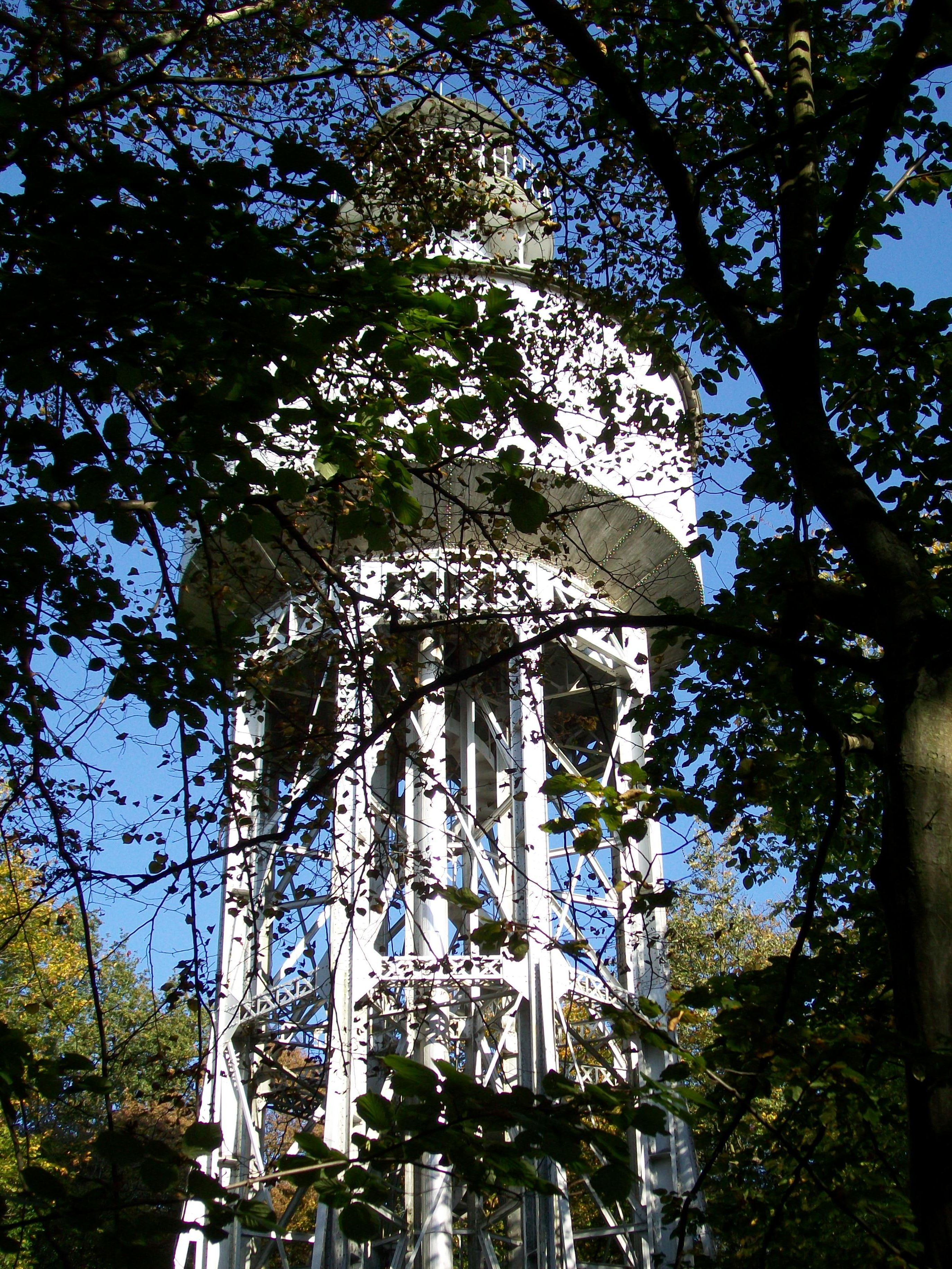 Construit en 1895 et inscrit monument historiques depuis 1998, il s'agit de l'unique château métallique du nord de la France. Il est attribué à un élève de Gustave Eiffel et sert de réservoir communal.